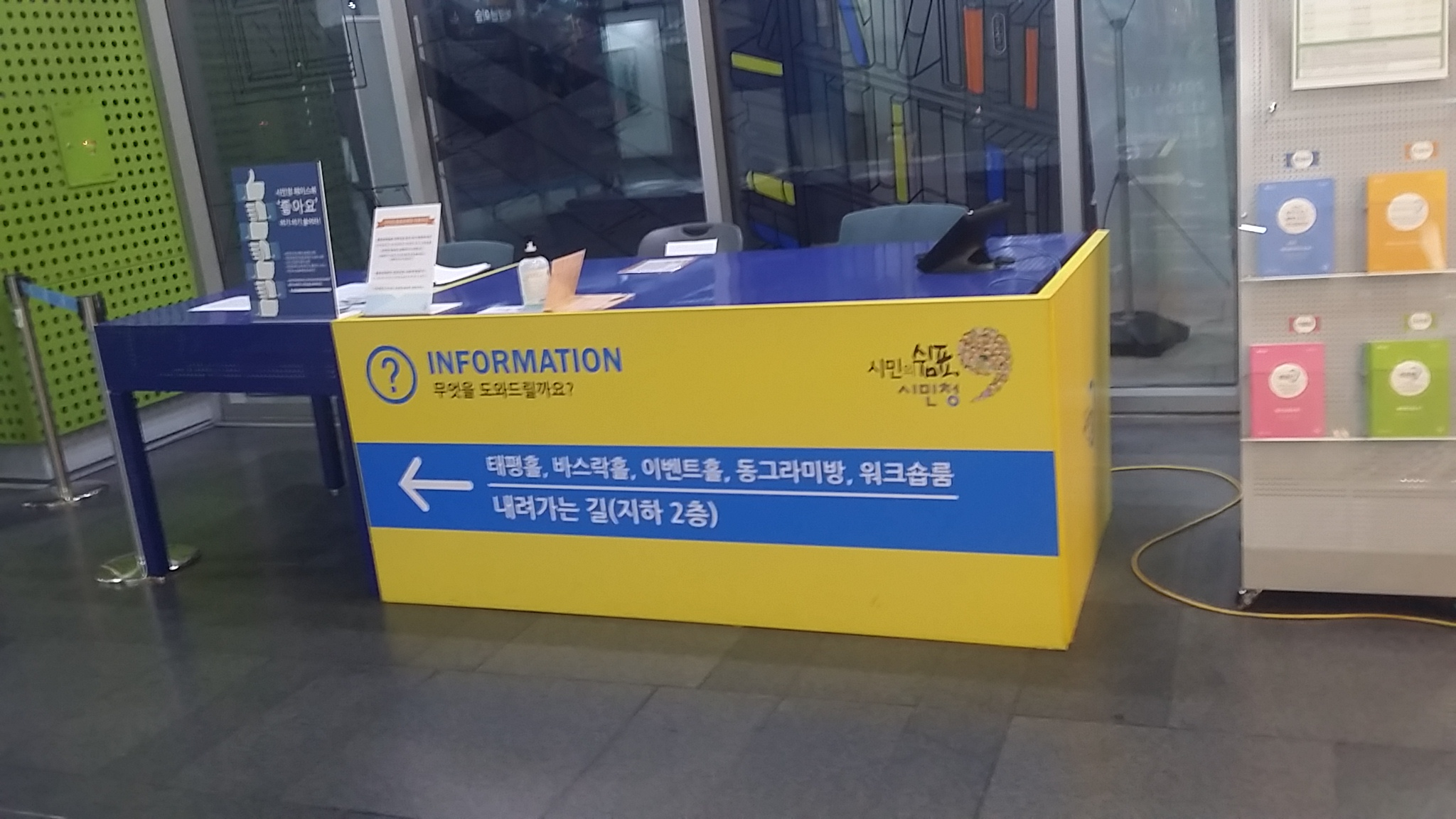 조선말: 서울 시민청 인포메이션